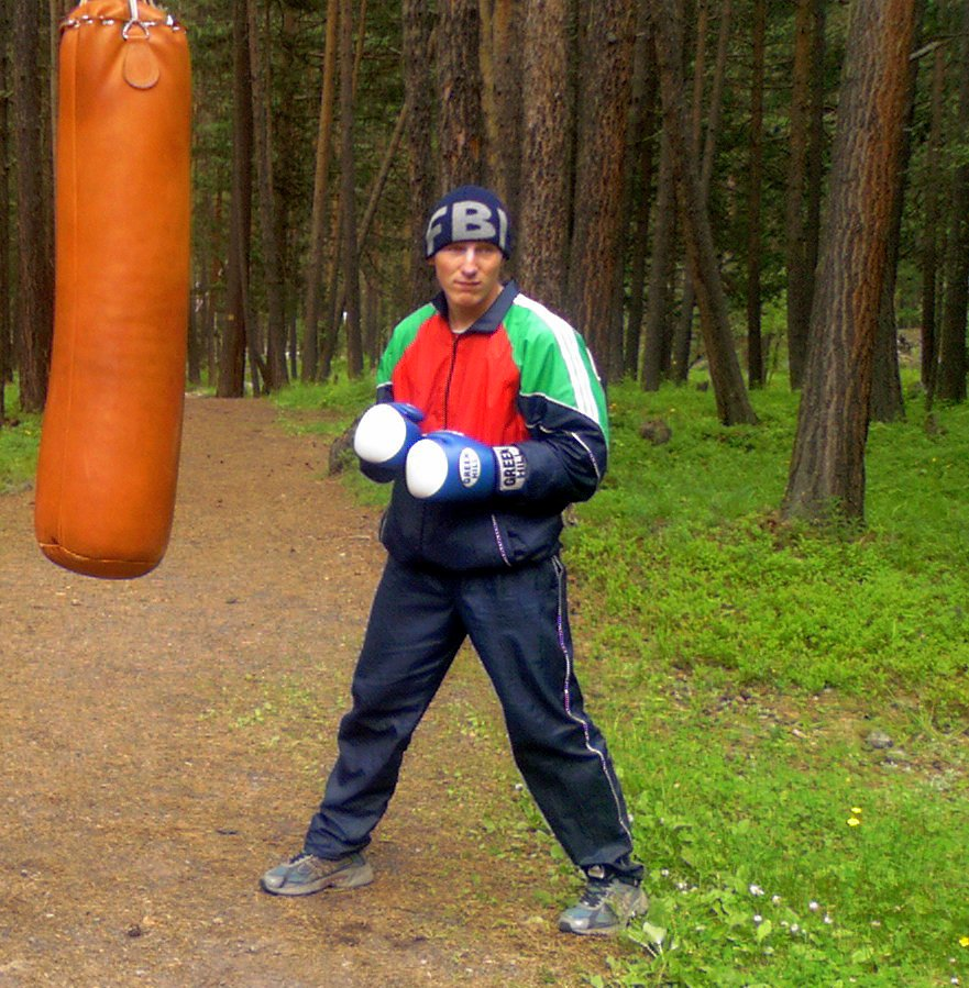 Миша в Терсколе.